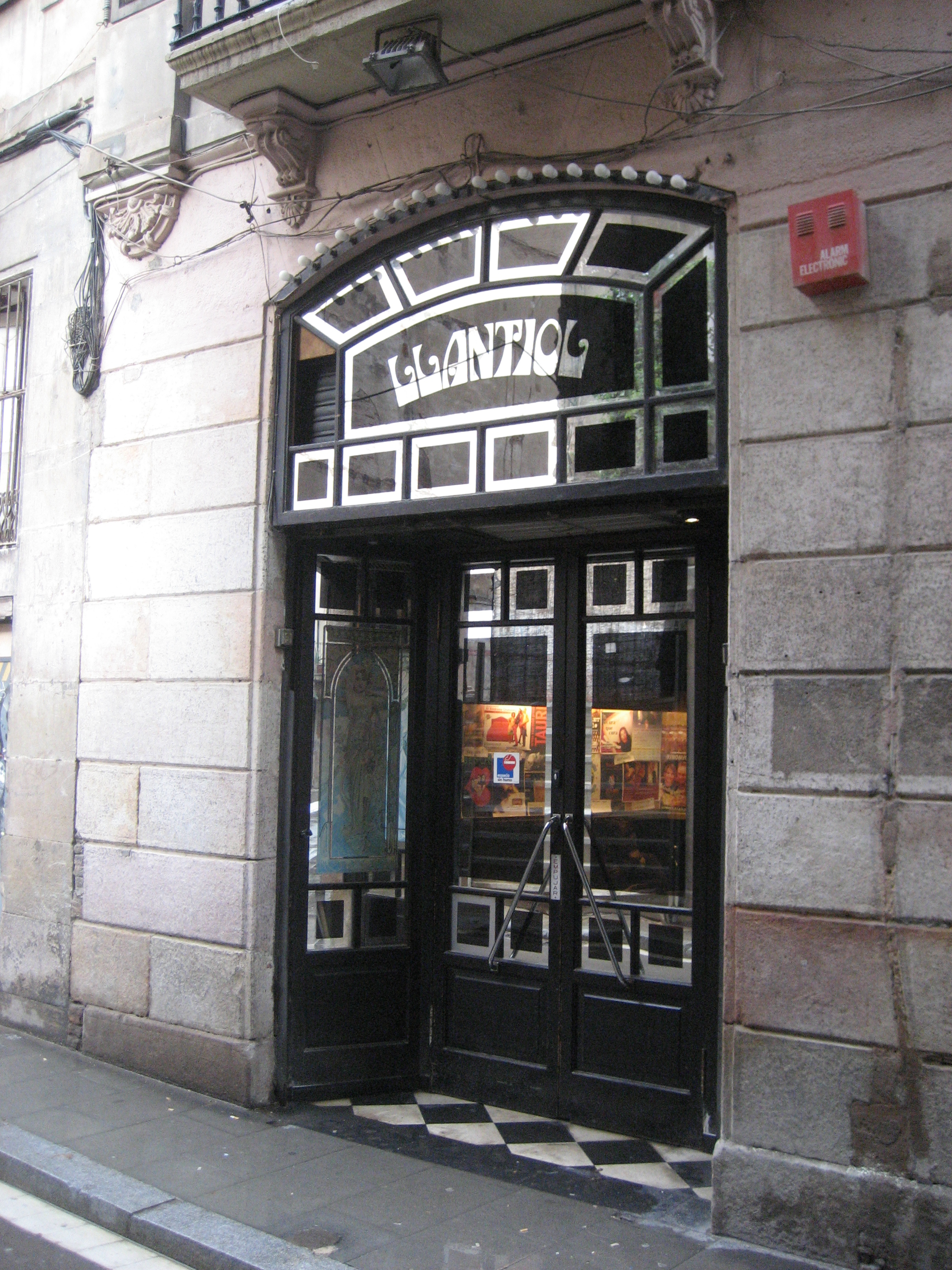 El Llantiol, Barcelona_novembre 2008